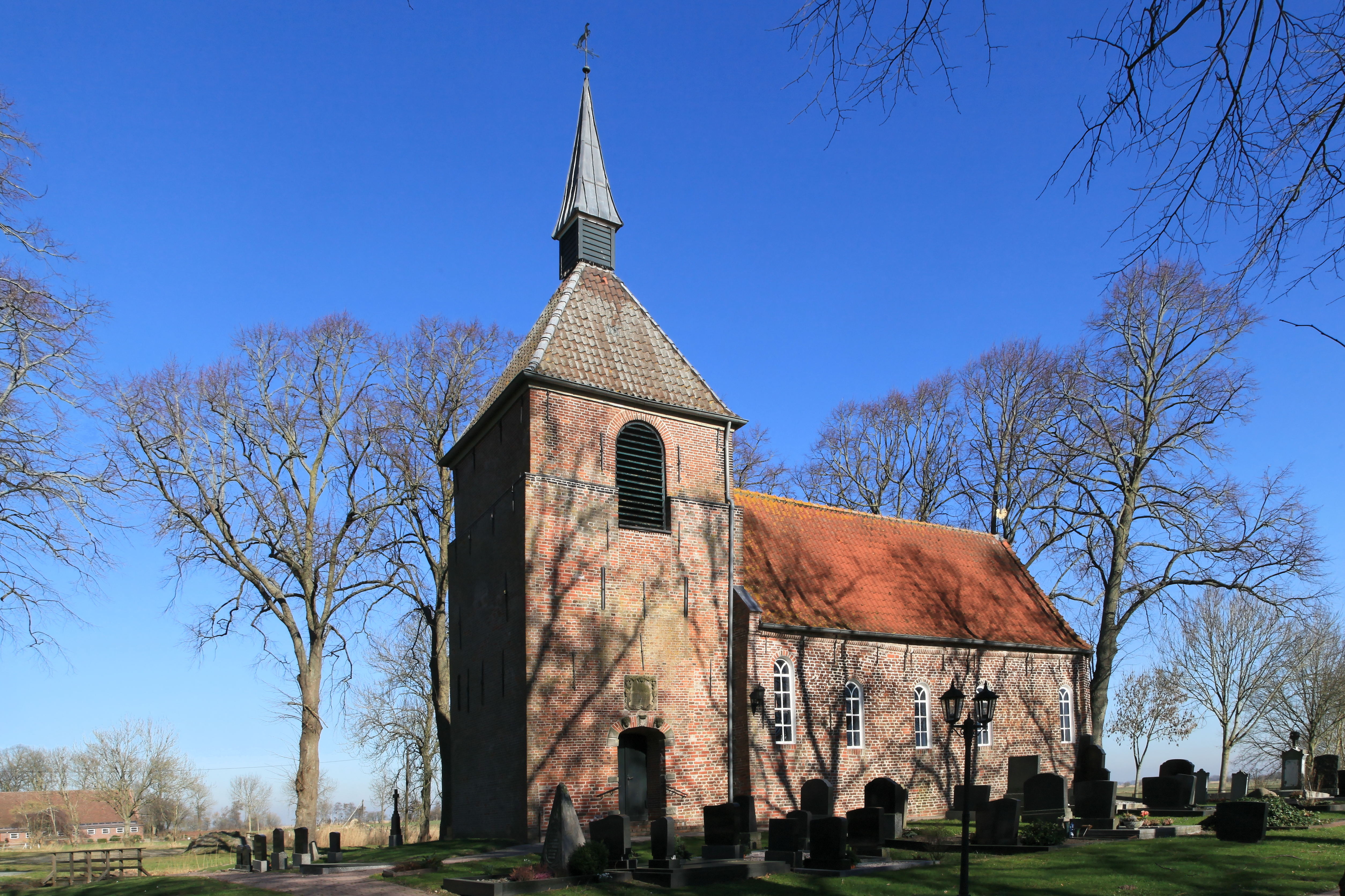 Friedhof und Kirche in Böhmerwold, Jemgum